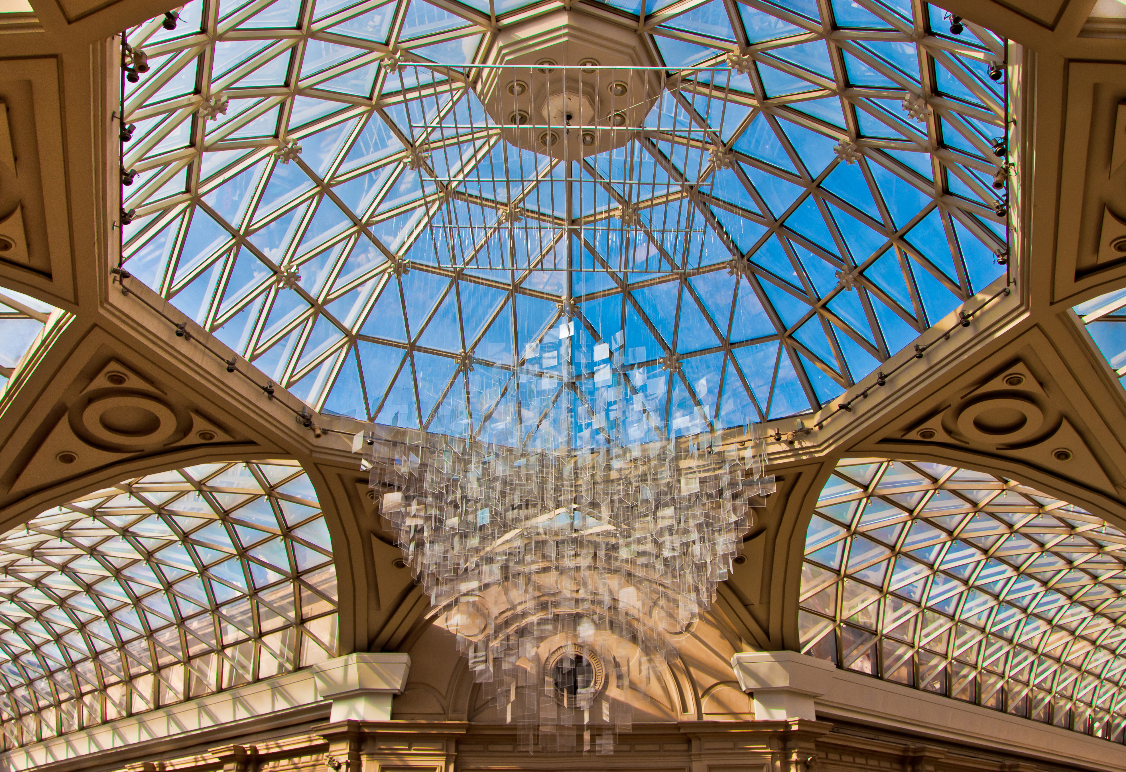 Galerías Pacífico, vista del techo.